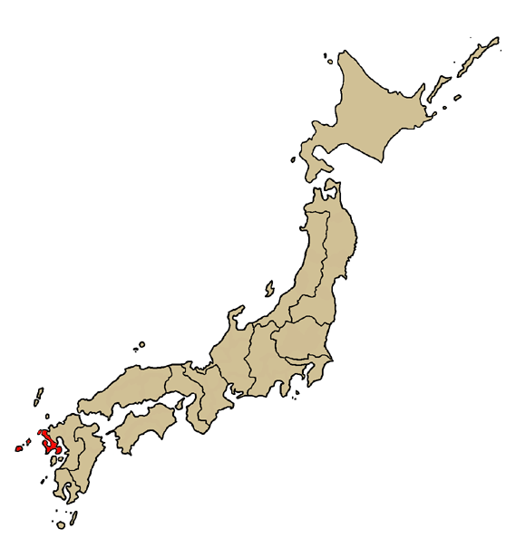 Mappa dell'arcidiocesi cattolica di Nagasaki, in Giappone. Lavoro personale.